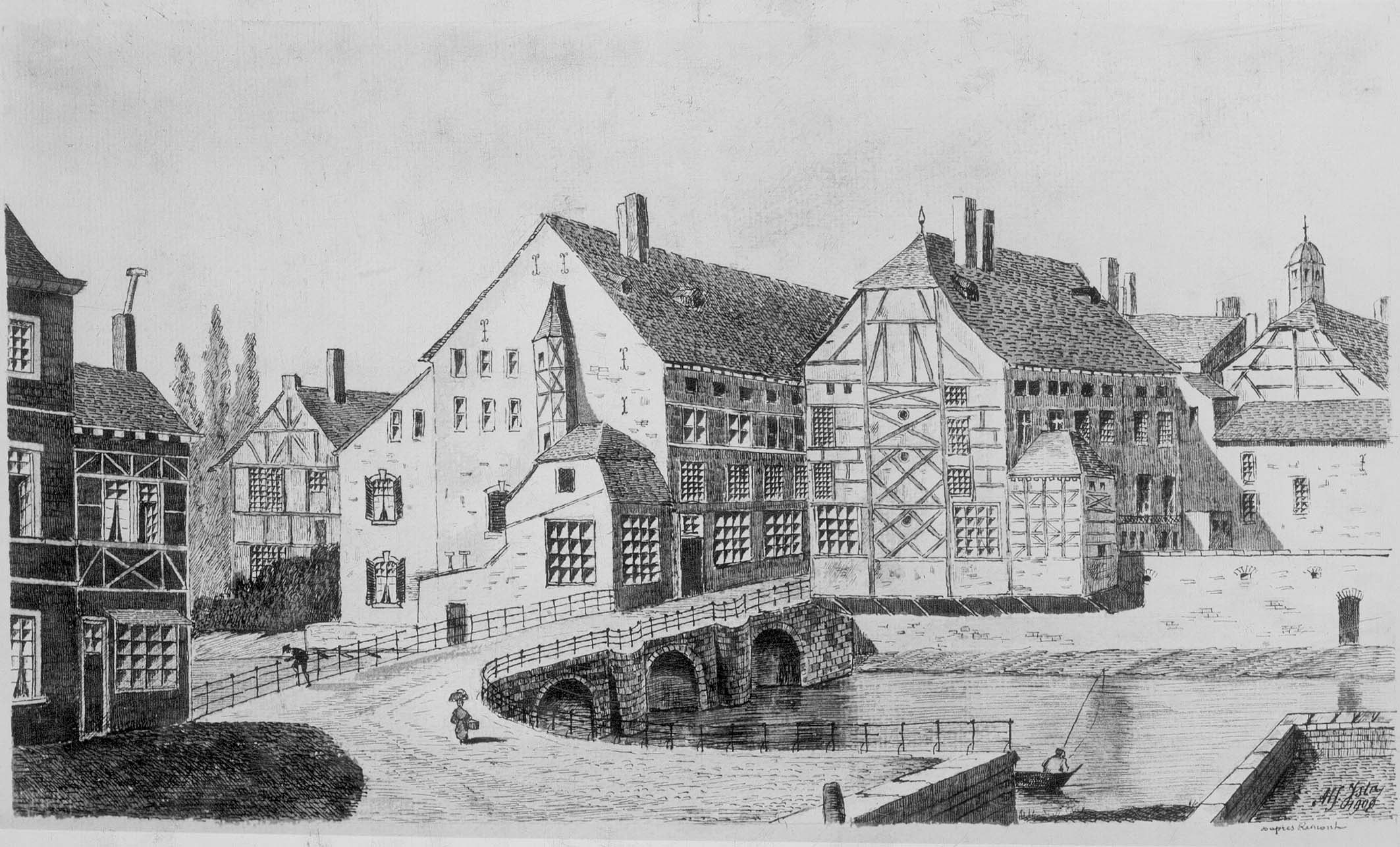 Dessin d'Alfed Ista du pont d'Île au XVIIIe, copie d'après Charles Remont d'après un document anonyme du XVIIIe, pont construit en 1572 et démoli en 1826